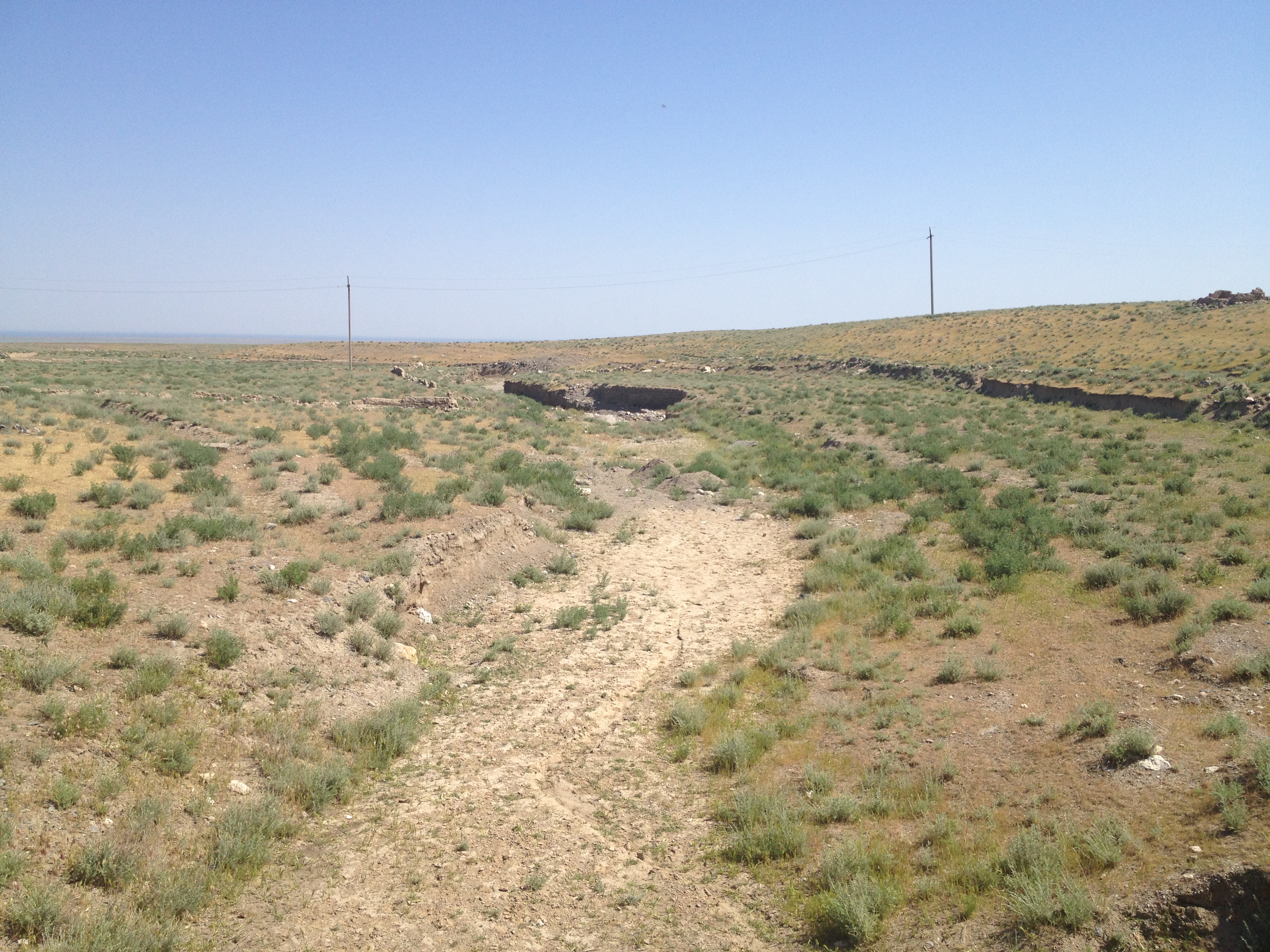 Сухое русло реки Гатча в низовьях